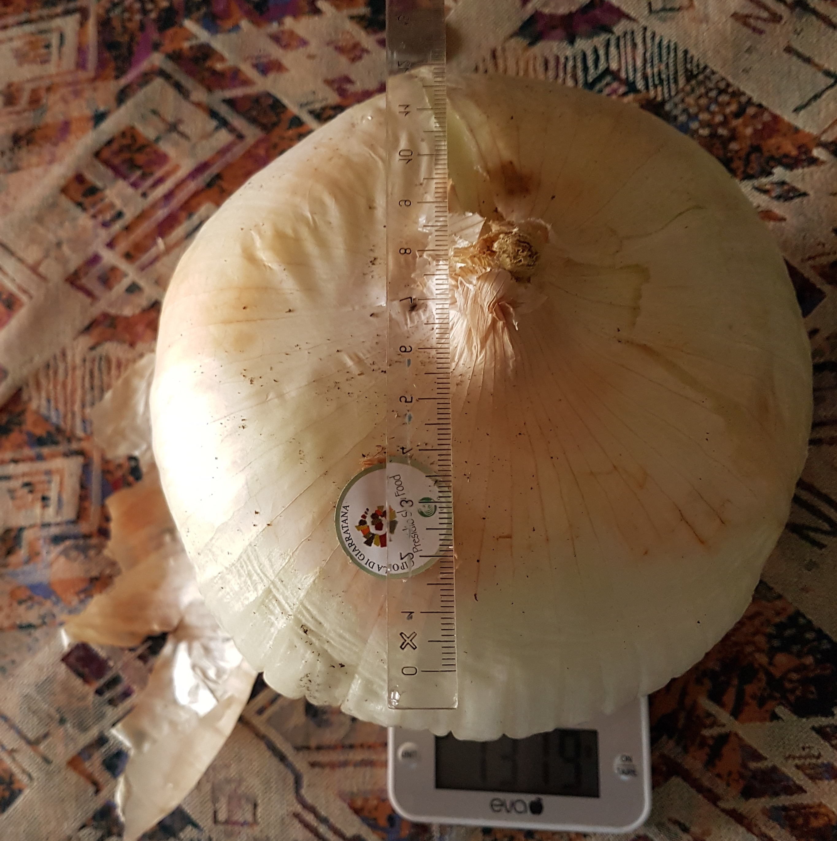 Cipolla di Giarratana peso e misura